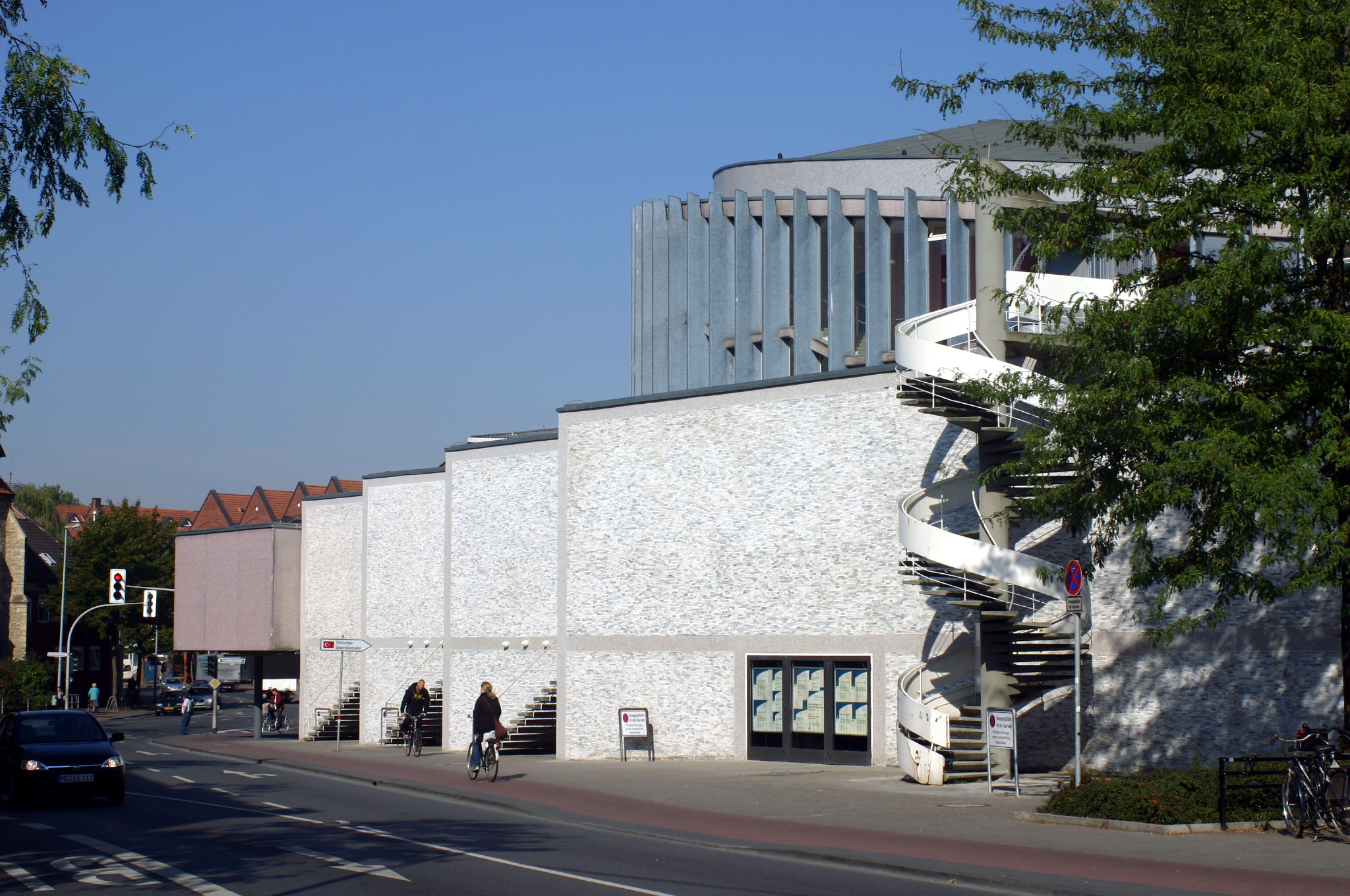 Münster, Stadttheater - Seitenansicht von der Voßgasse